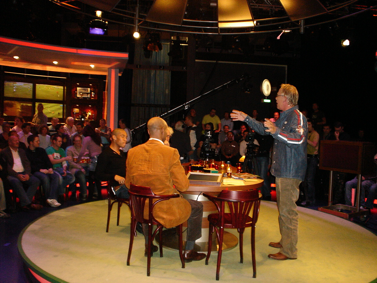 Jack Spijkerman, Humberto Tan, Nigel de Jong en Henk Spaan voorafgaand aan een uitzending van Cafe de Sport in Studio 1 op het Mediapark